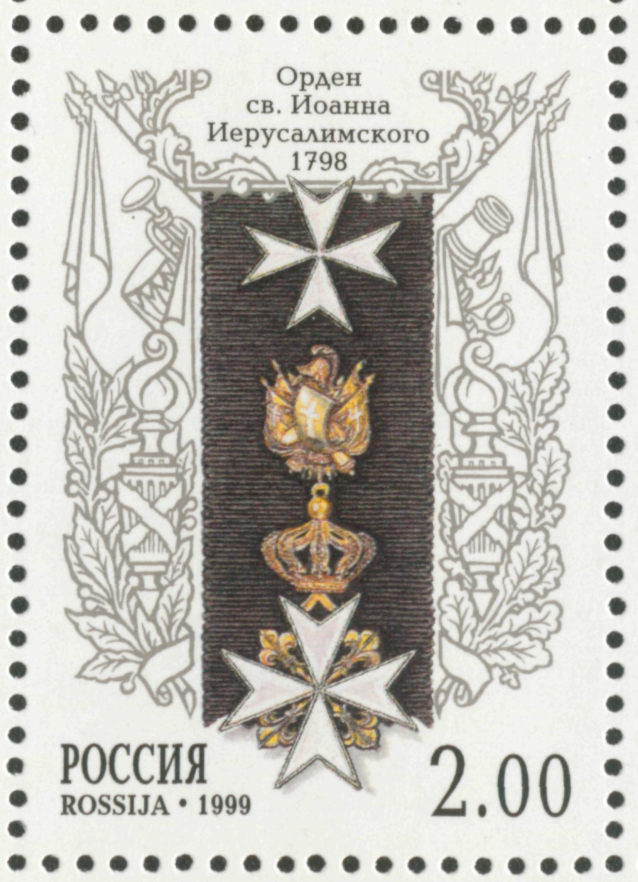 Ордена Российской Империи. Орден Иоанна Иерусалимского. Из малого марочного листа России из пяти марок 1999 года.